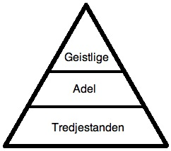 Generell skisse av strukturen i et stendersamfunn.